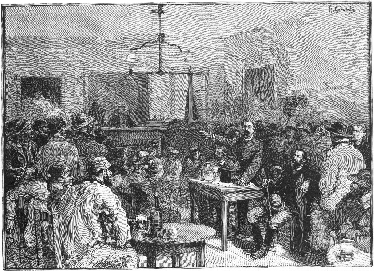 "Decazeville. - M. Basly, député de la Seine, présidant une réunion dans un café de Firmy [sic]. (Dessin de M. Gérardin, d'après le croquis de M. Dick)".